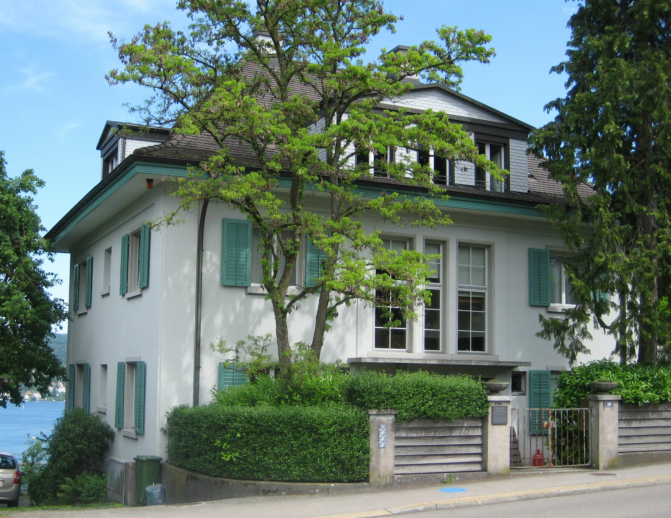 Thomas Manns früheres Haus in Kilchberg, Alte Landstrasse 39, heutiger Zustand